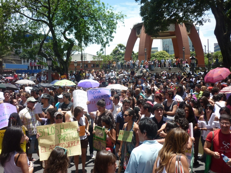 Marcha de las putas en Costa Rica, frente a la catedral metropolitana